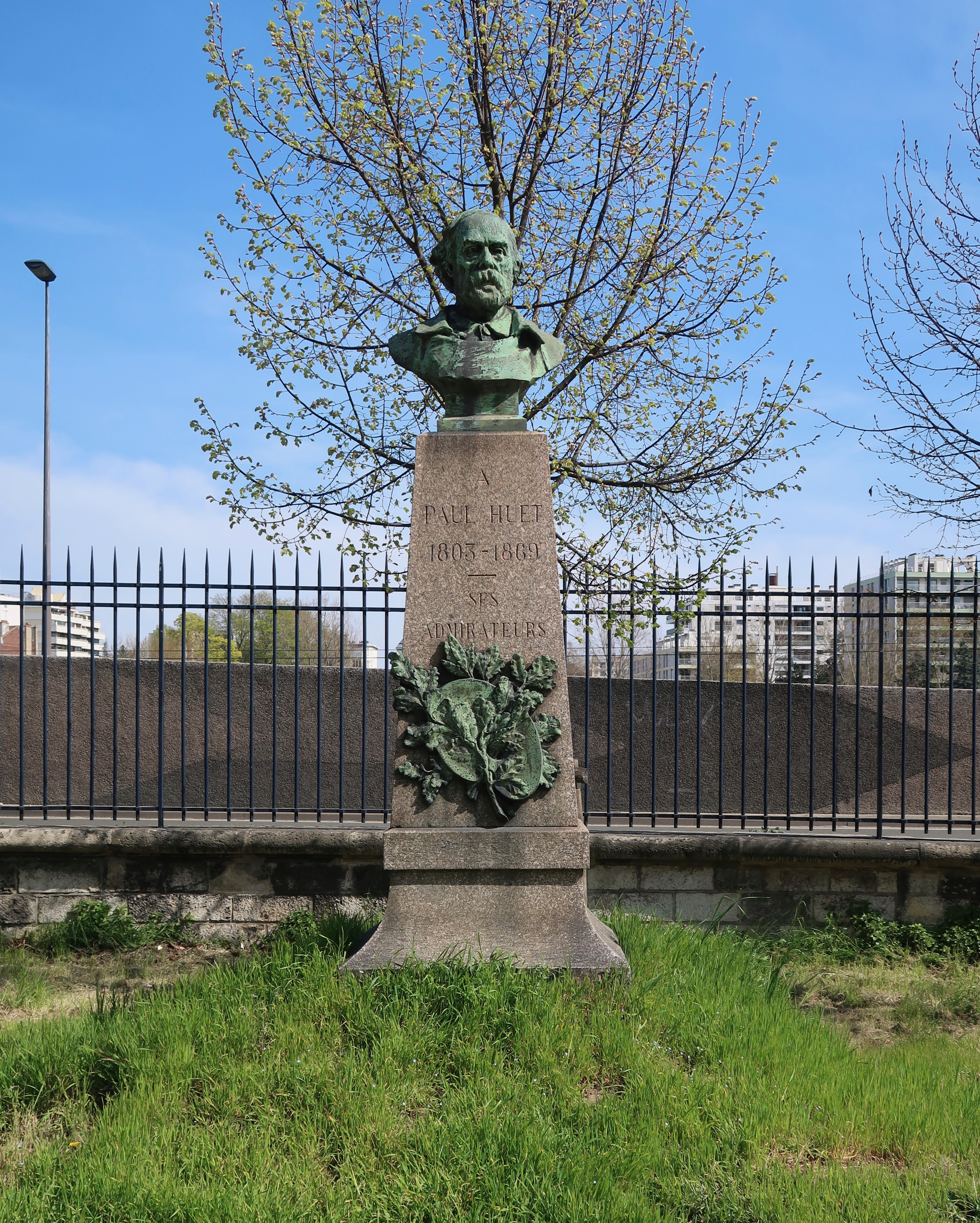 Monument à Paul Huet, parc de Saint-Cloud (Hauts-de-Seine).